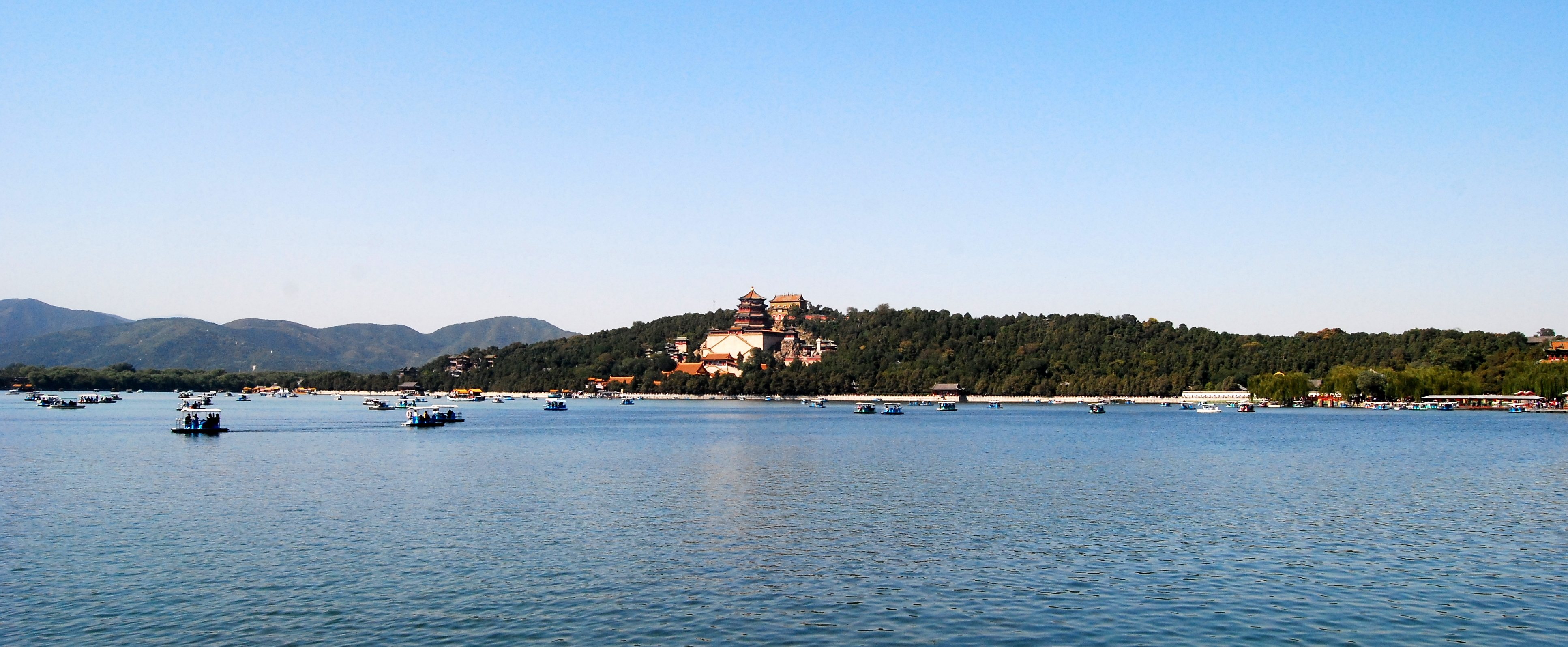 远眺万寿山